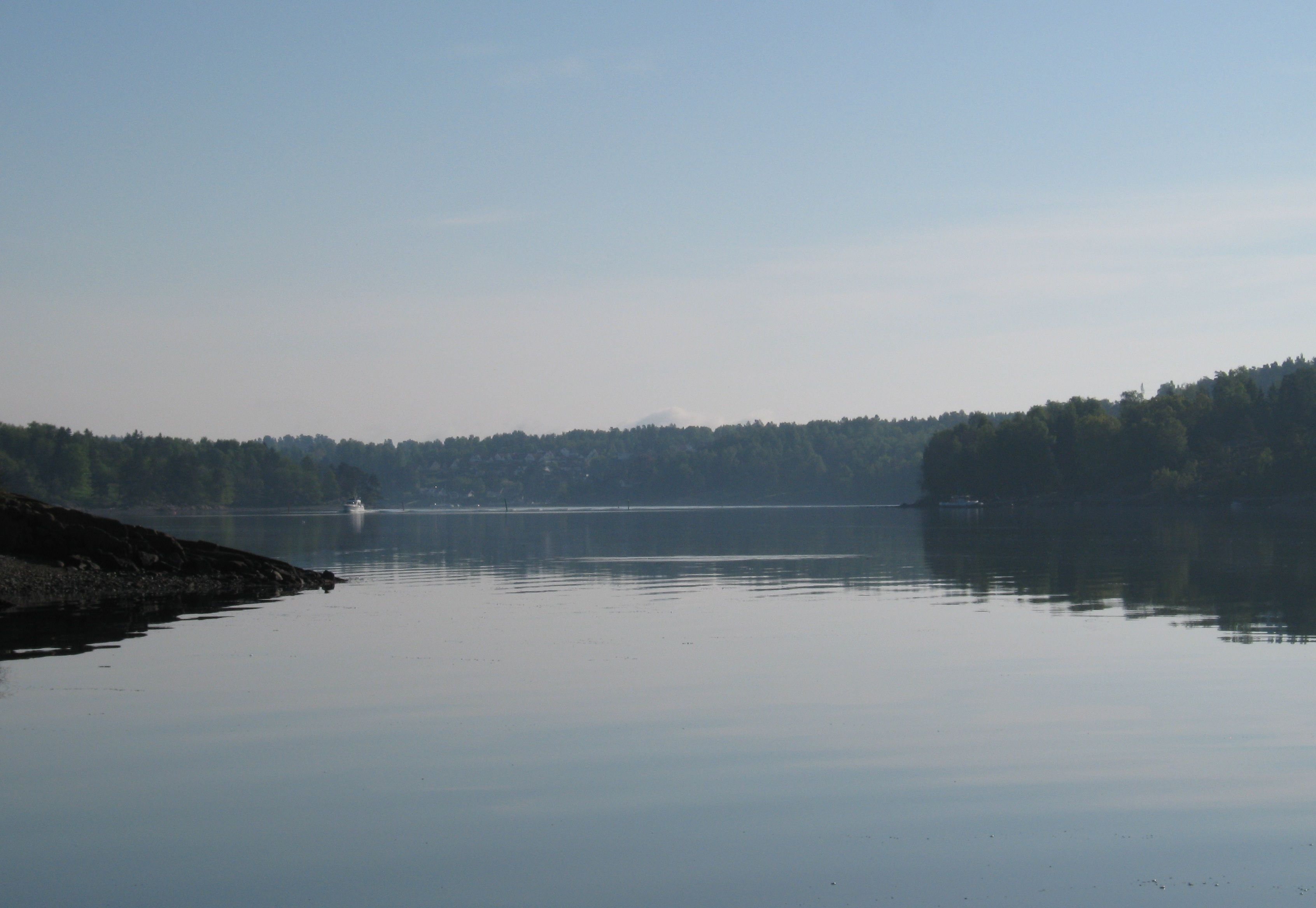 Tønsbergfjorden sett fra Trælsodden